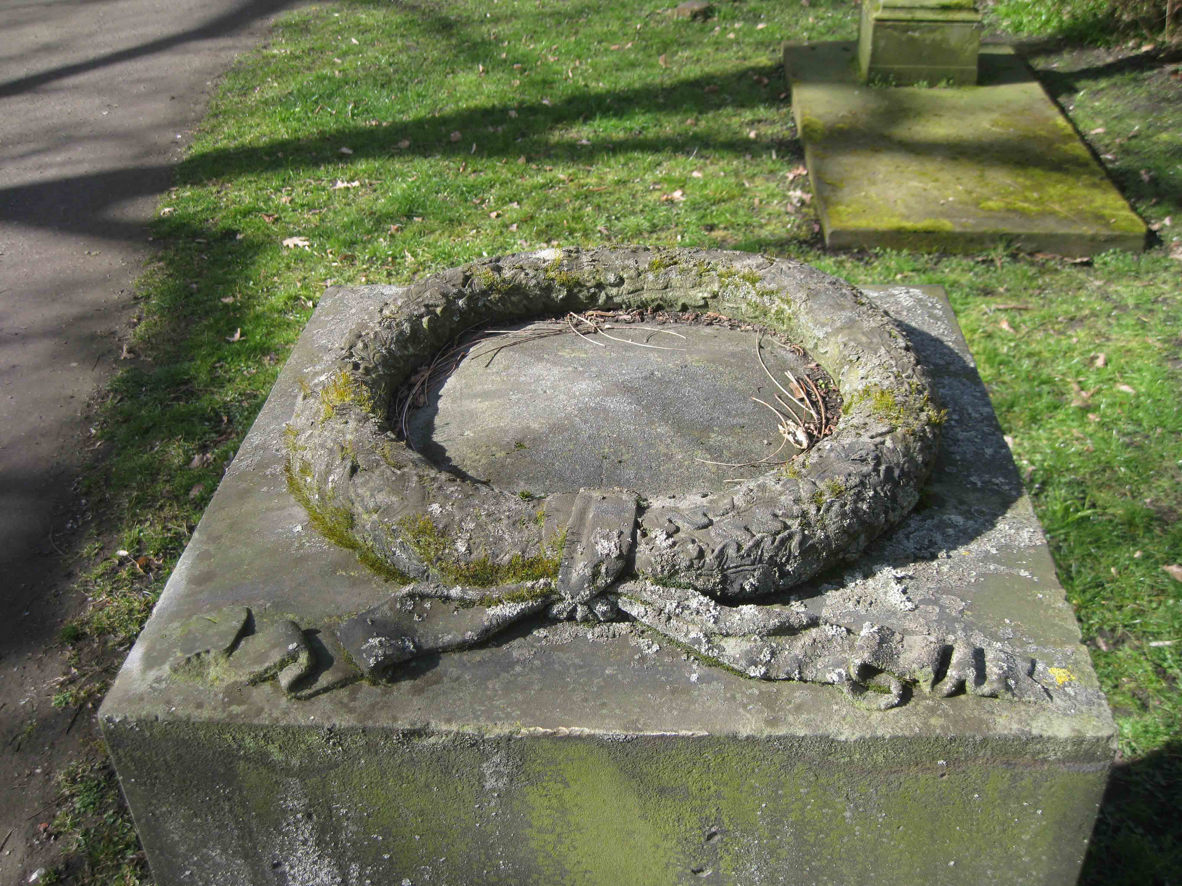 Grabmal von Georg Wilhelm Ahrbeck, Steinquader mit Kranz aus Eichenlaub und Bändern